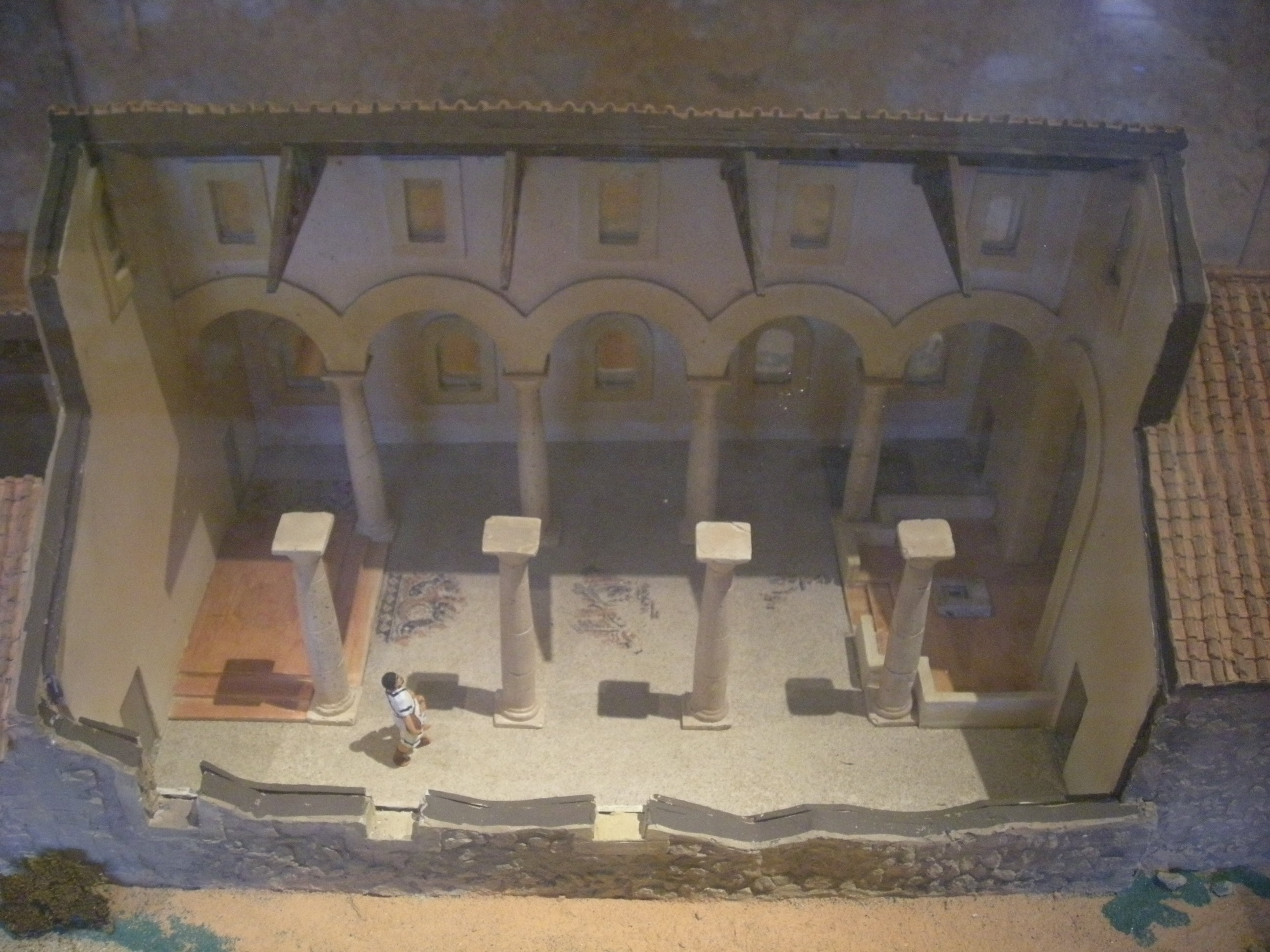 Maqueta de la Basílica Paleocristiana de Son Peretó al Museu d'Història de Manacor.